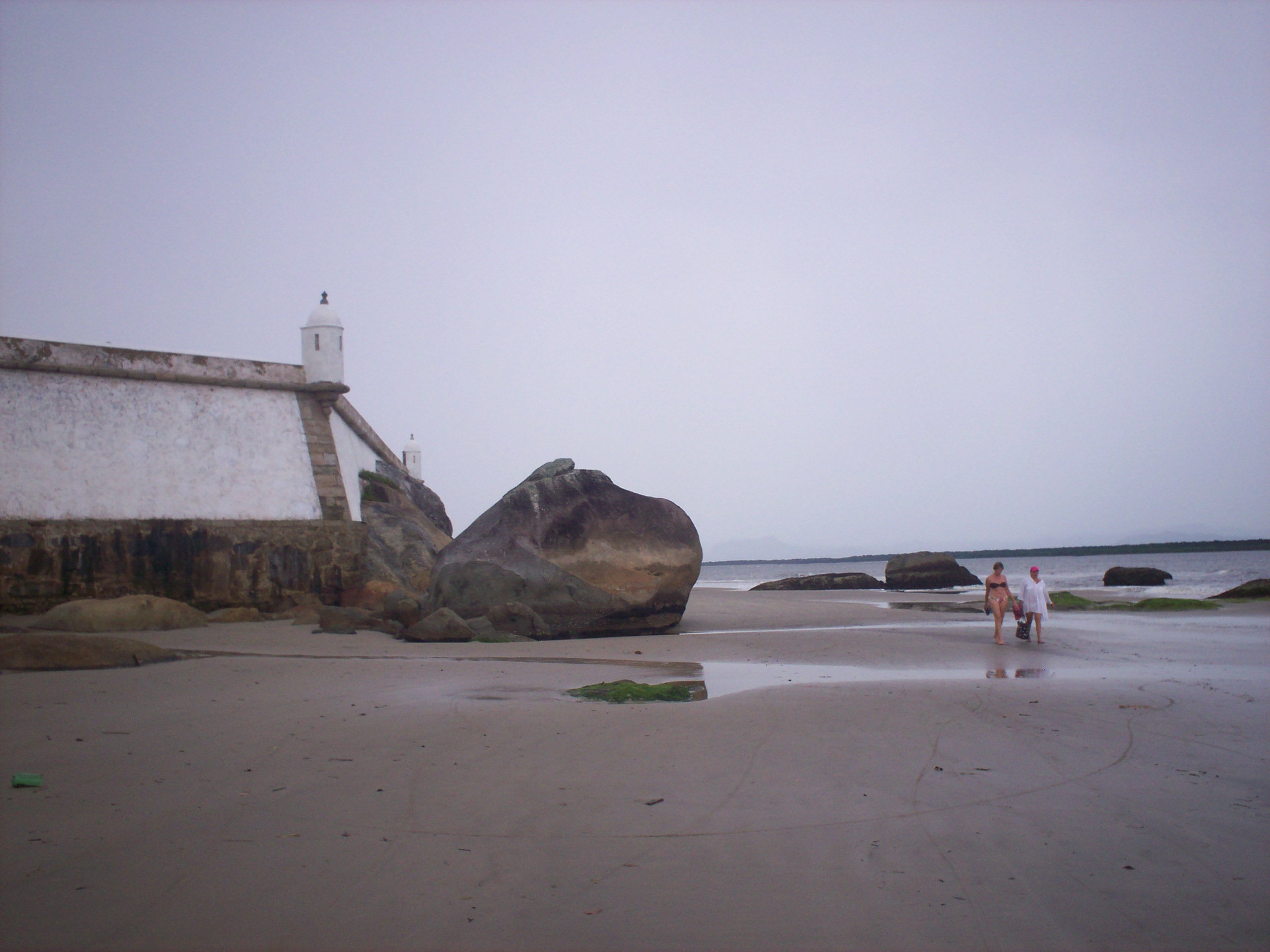 Fortaleza de Nossa Senhora dos Prazeres, Ilha do Mel, Paraná, Brasil